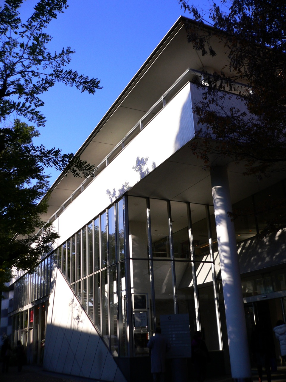 ヒルサイドテラス